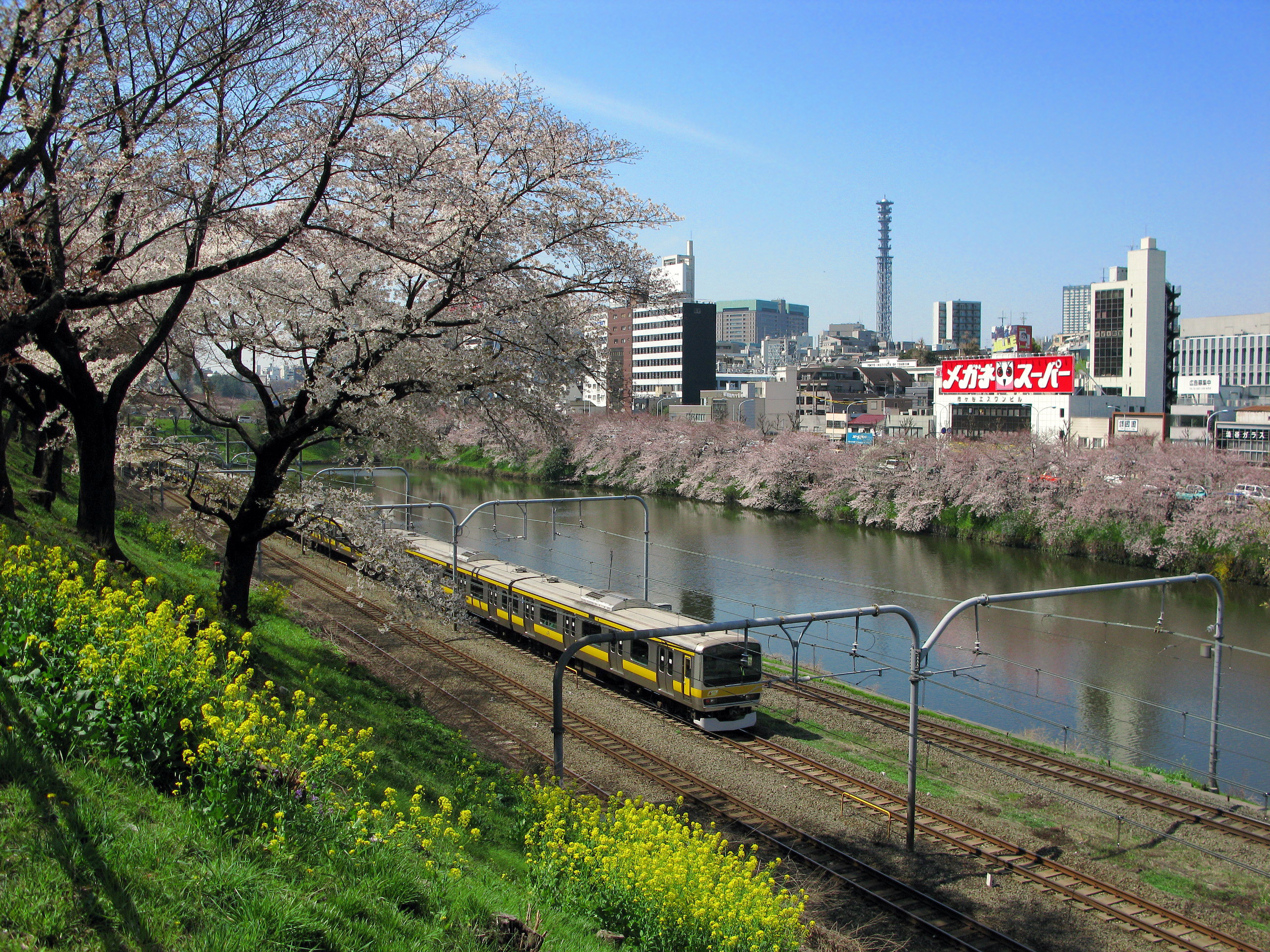 外濠公園より外濠（牛込濠）と桜並木を望む。（中央・総武緩行線飯田橋駅付近）（東京都千代田区）